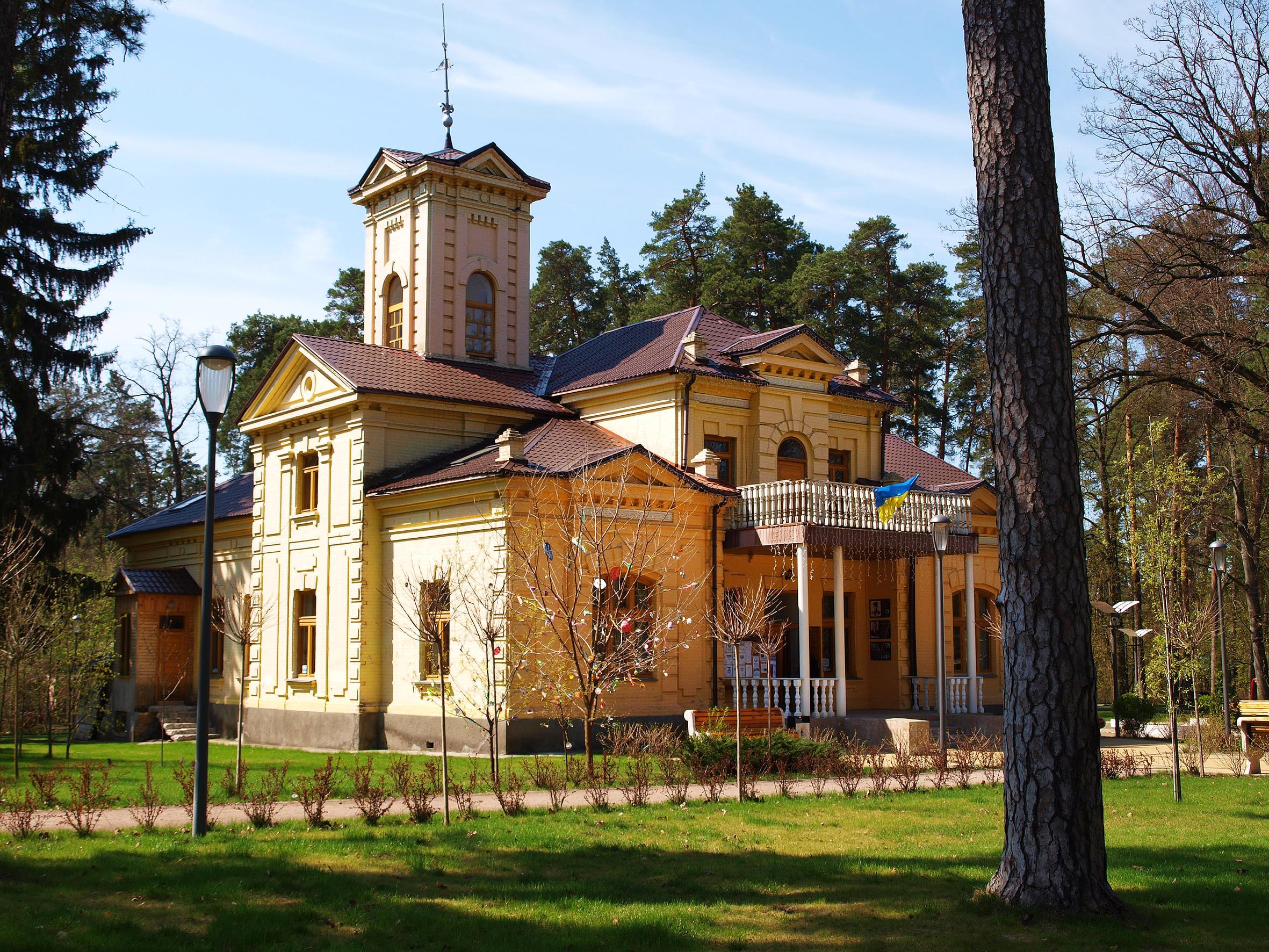 Музей «Уваровський дім» у Ворзелі.